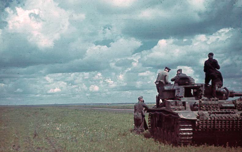 Deutsche Panzerspitze in der Kalmückensteppe nördlich von Stalingrad September 1942